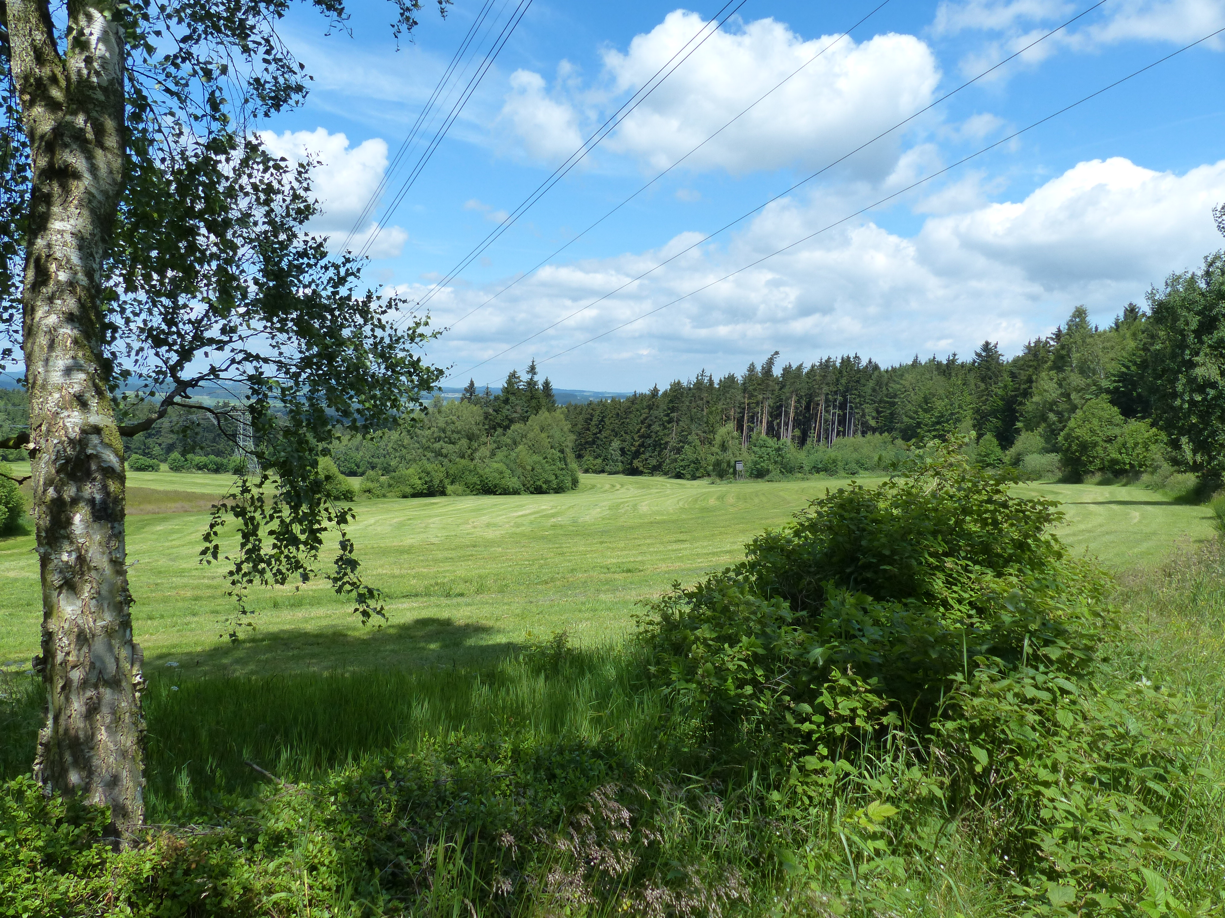 Hallerstein, Ortsteil von Schwarzenbach an der Saale